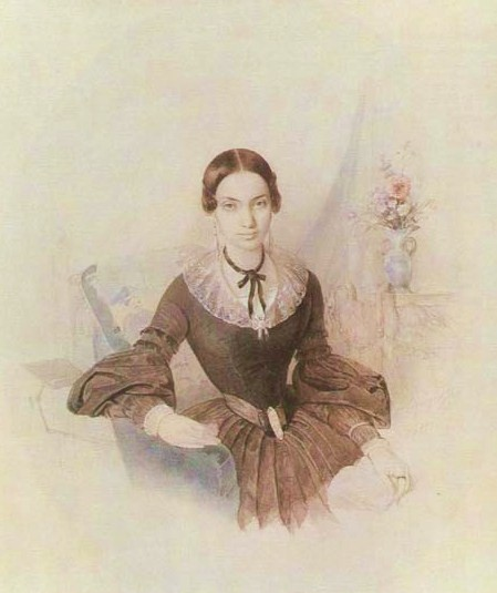 Елизавета Богдановна Грановская (1824-1857).